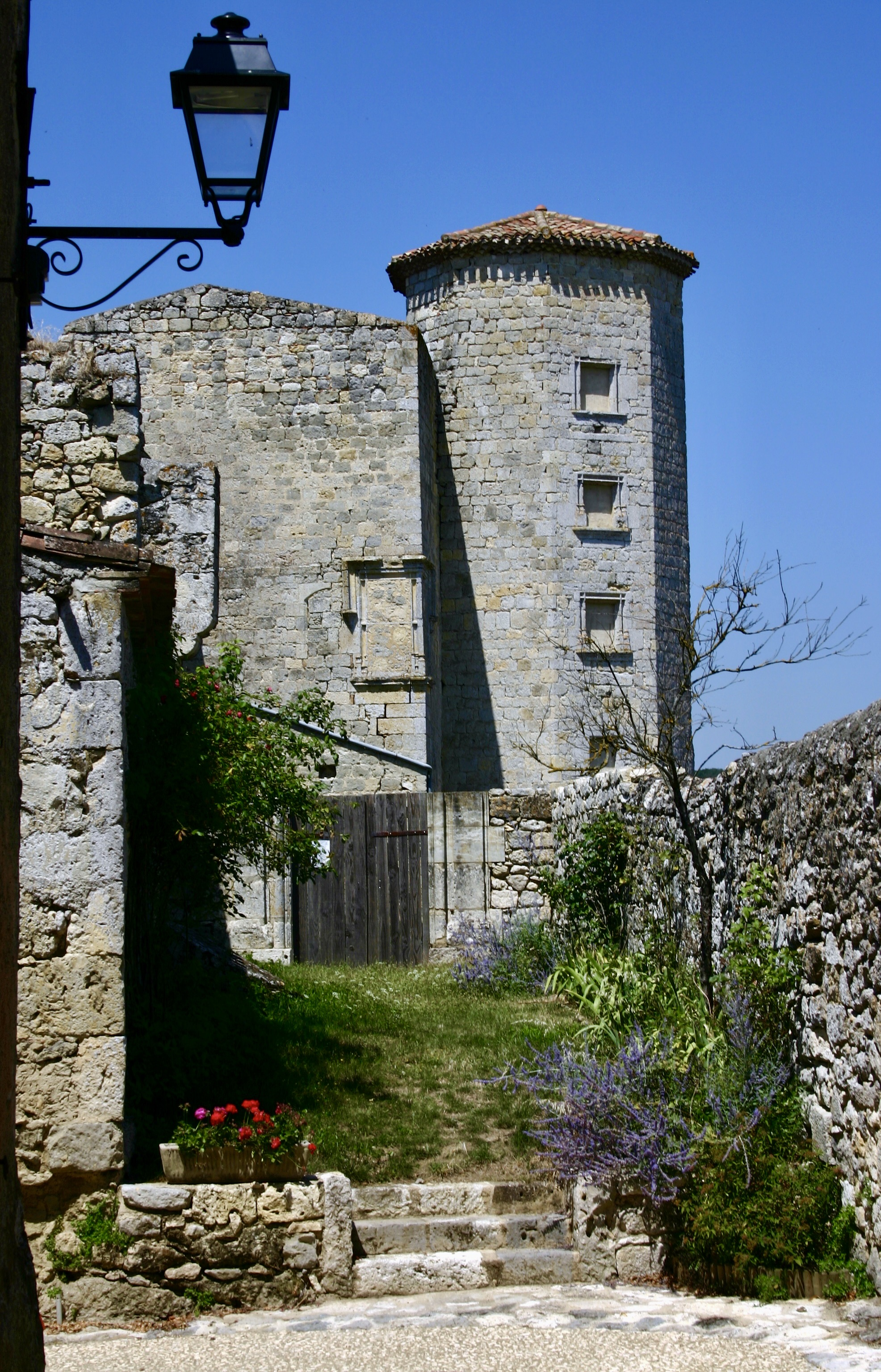 Tour médiévale heptagonale de Larroque-Engalin (département du Gers, France). Copyright (c) 2006 David Farreny. Permission vous est donnée de copier, distribuer et/ou modifier ce document selon les termes de la Licence GNU Free Documentation License, Version 1.2 ou ultérieure publiée par la Free Software Foundation ; sans sections inaltérables et sans pages de couverture. [1] Permission is granted to copy, distribute and/or modify this document under the terms of the GNU Free Documentation License, Version 1.2 or any later version published by the Free Software Foundation; with no Invariant Sections, no Front-Cover Texts, and no Back-Cover Texts. [2]